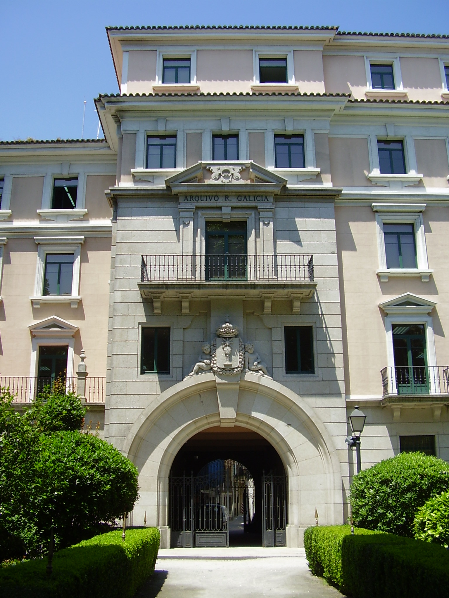 Frente del Archivo del Reino de Galicia, en el Jardín de San Carlos, en La Coruña